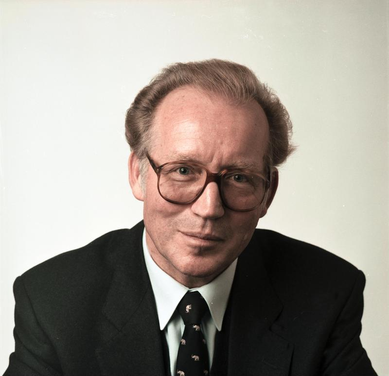 28.11.1990 Dr. Paul Wilhelm Staatssekretär der Landesvertretung des Freistaates Bayern beim Bund